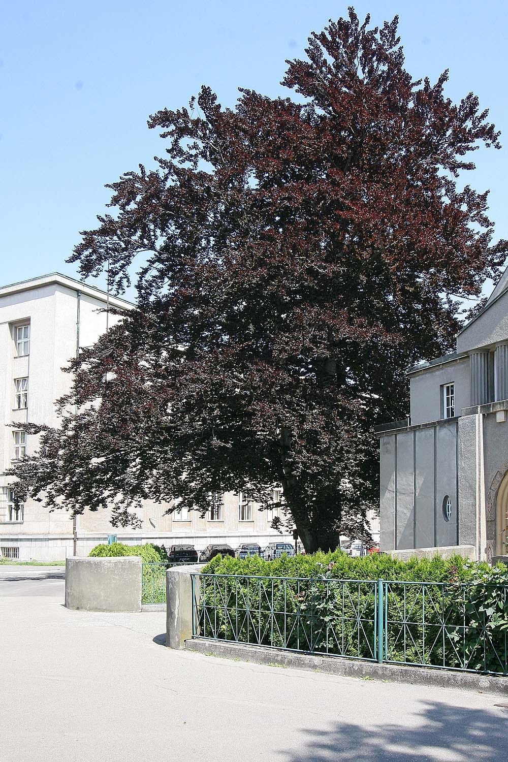 Hradec Králové - Památný buk u Kavalírů